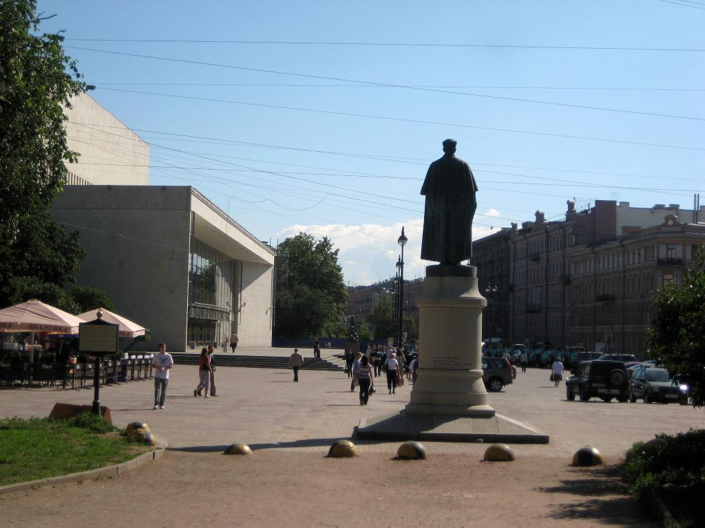 Вид на грека сзади